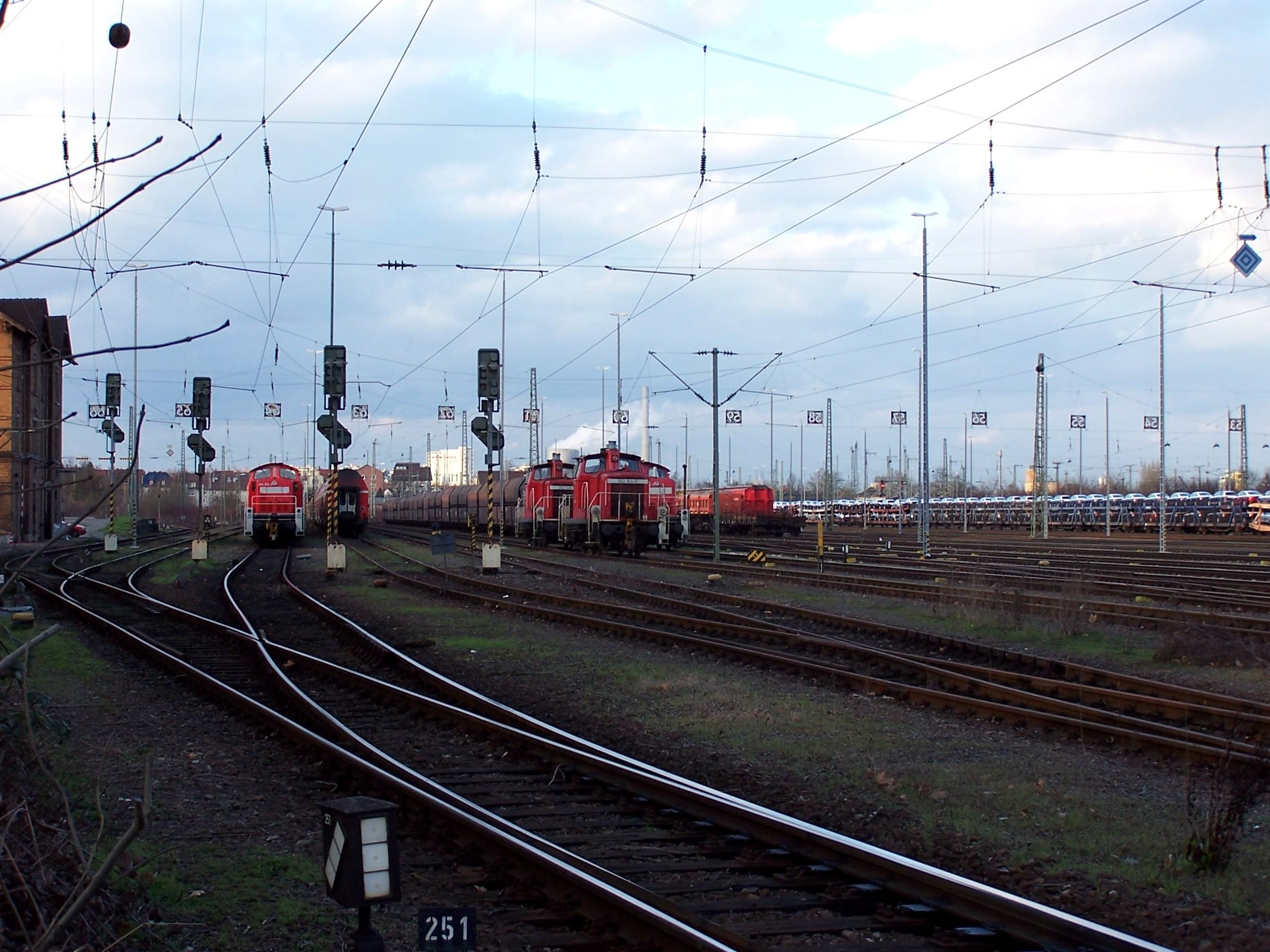 Rangierbahnhof Böckingen. Links das ehemalige Dienstgebäude.